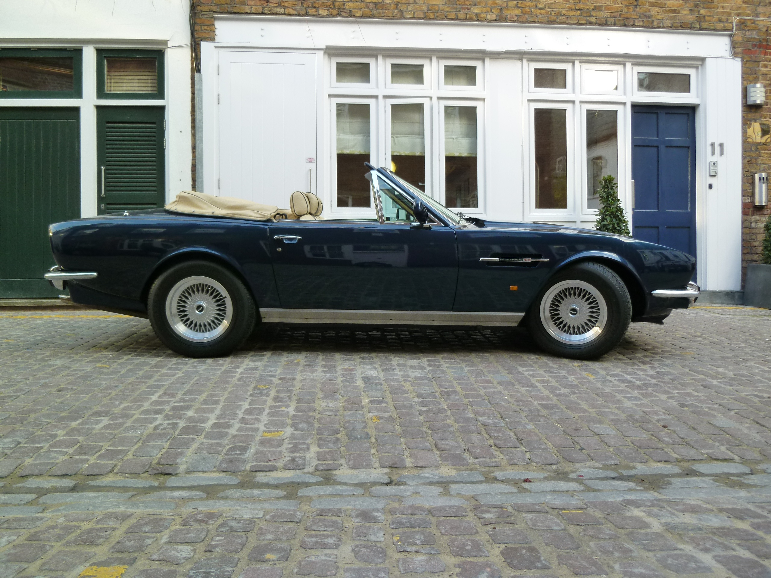 Aston Martin - V8 Volante